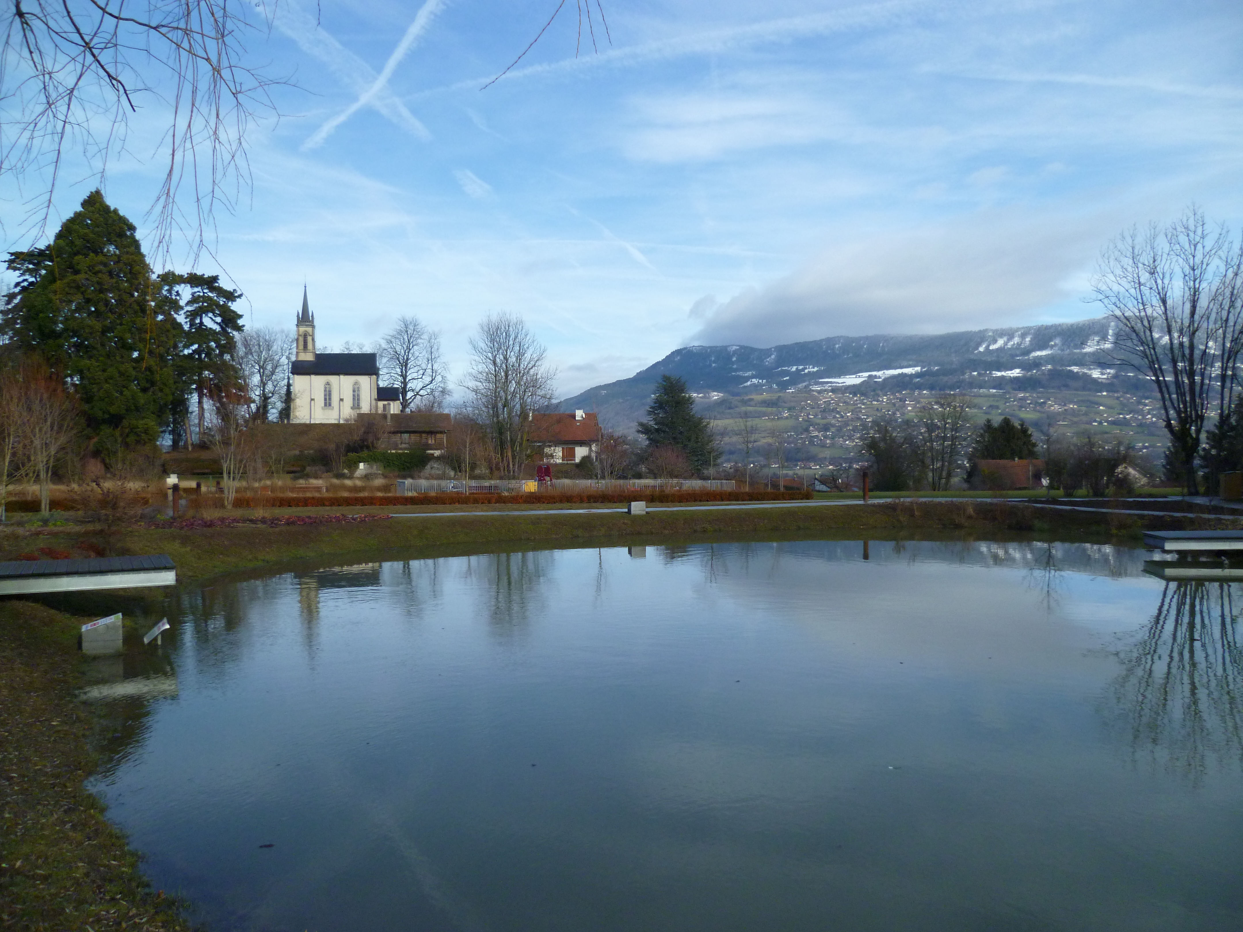 l'etang de Vétraz-Montoux